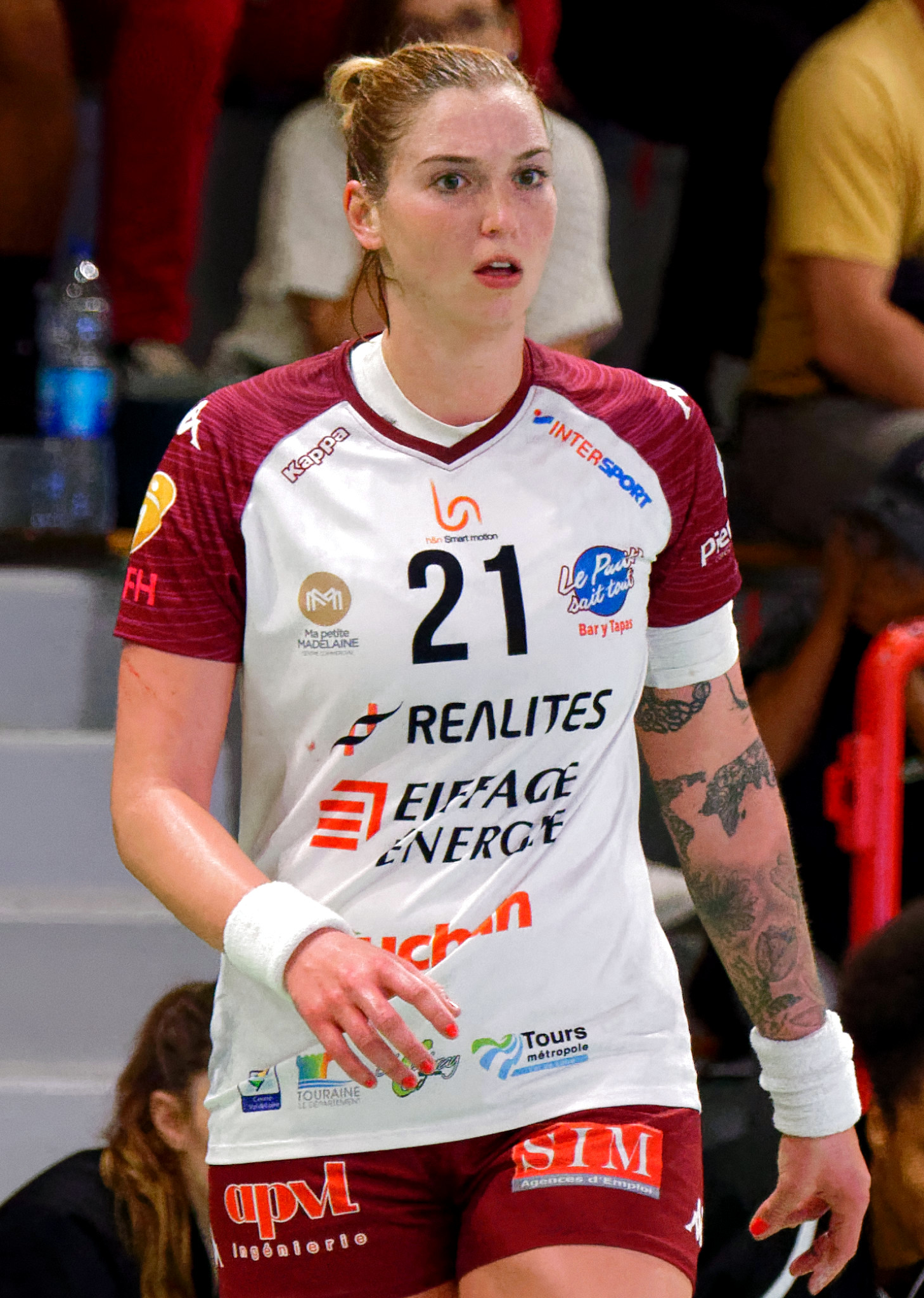 Rencontre de LFH entre Paris92 et Chambray. A Meudon la forêt, le 10 octobre 2018.